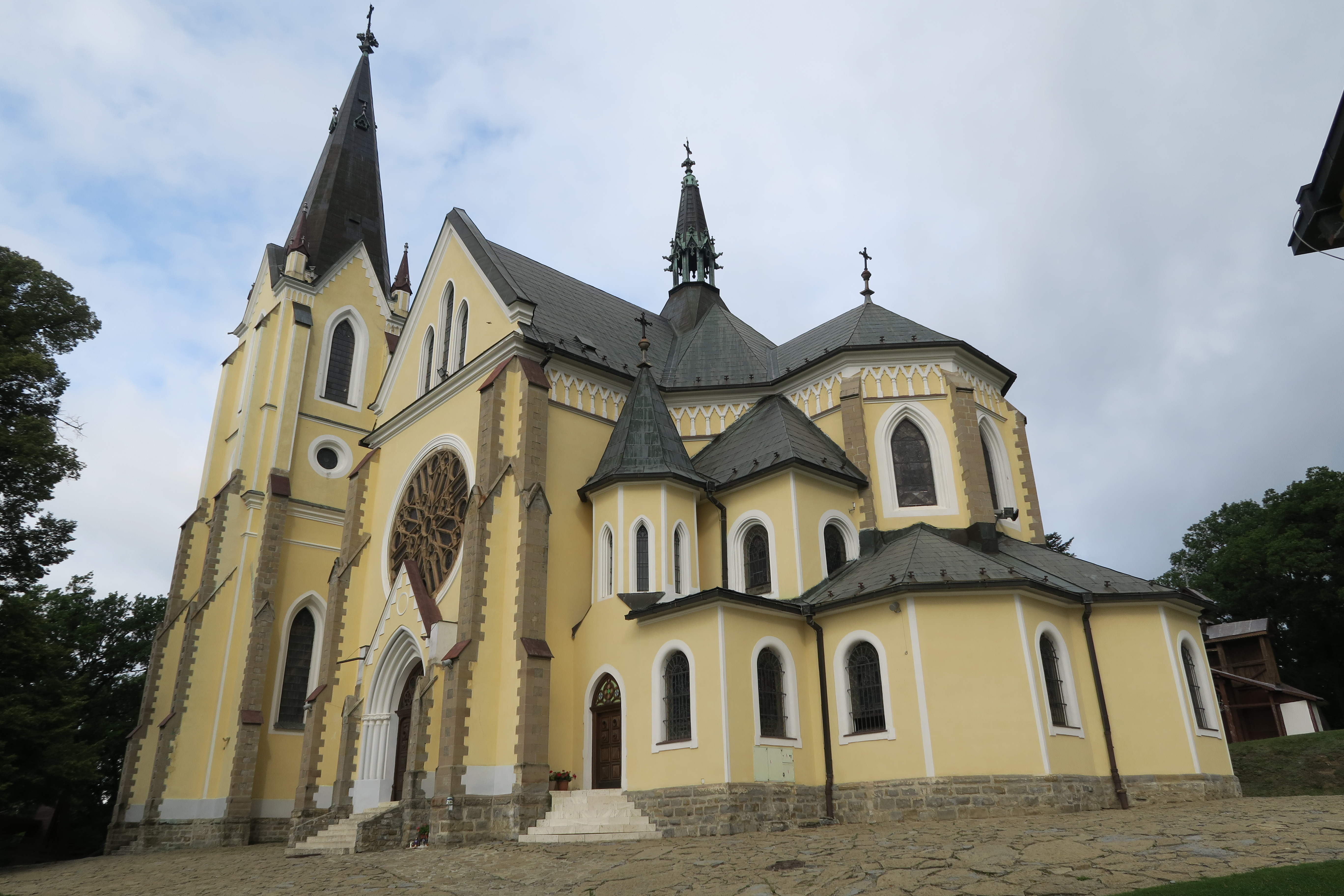 Basilica of the Visitation, Levoča